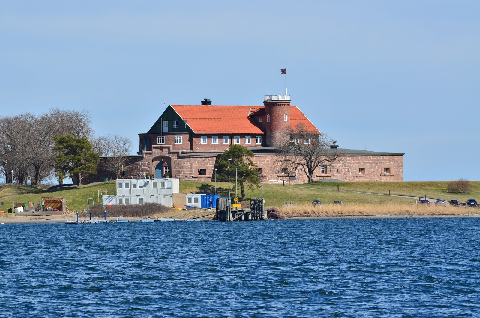 Norske Løve, festningen sett fra syd.